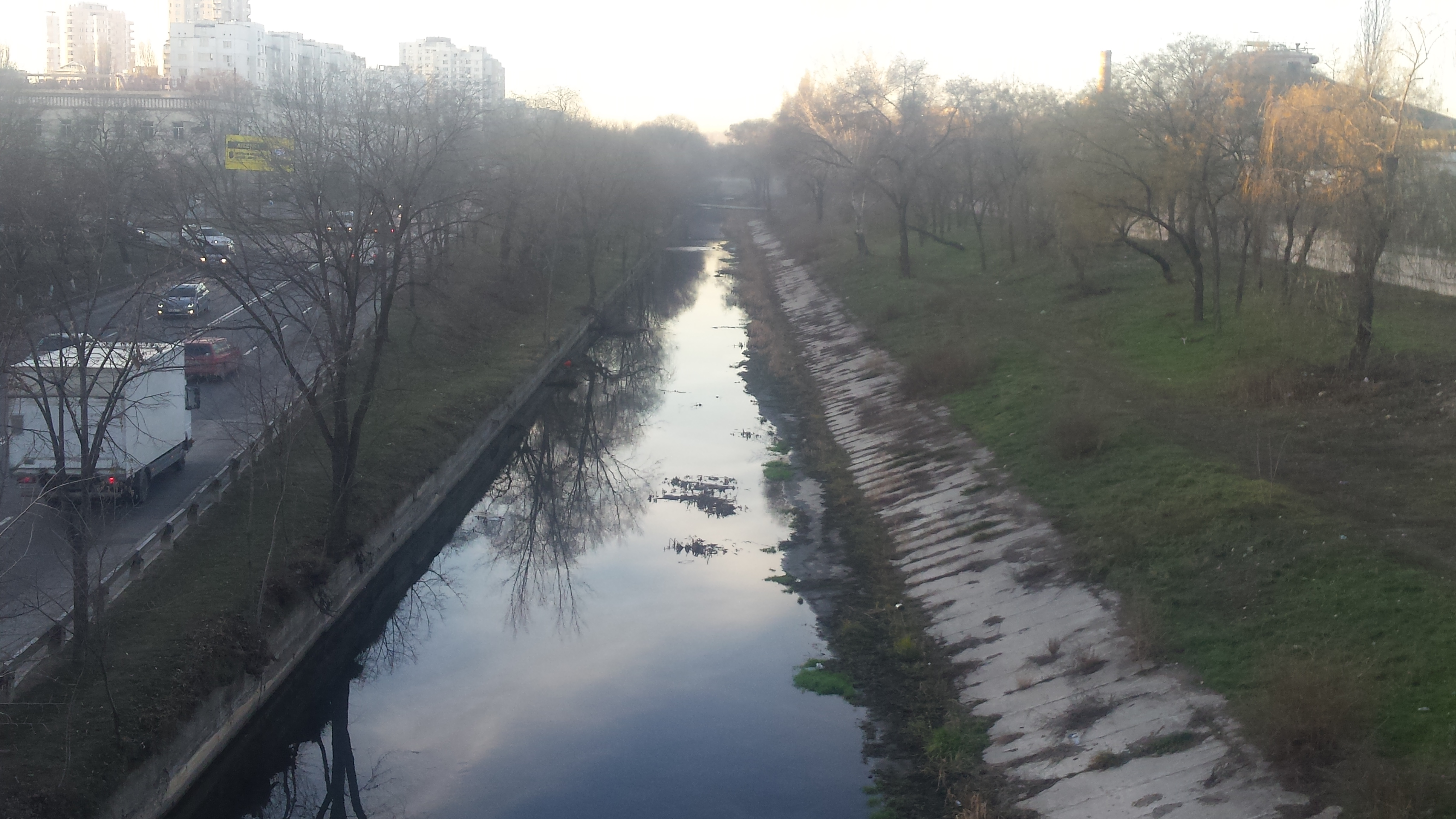 Râul Bîc prin Chișinău.